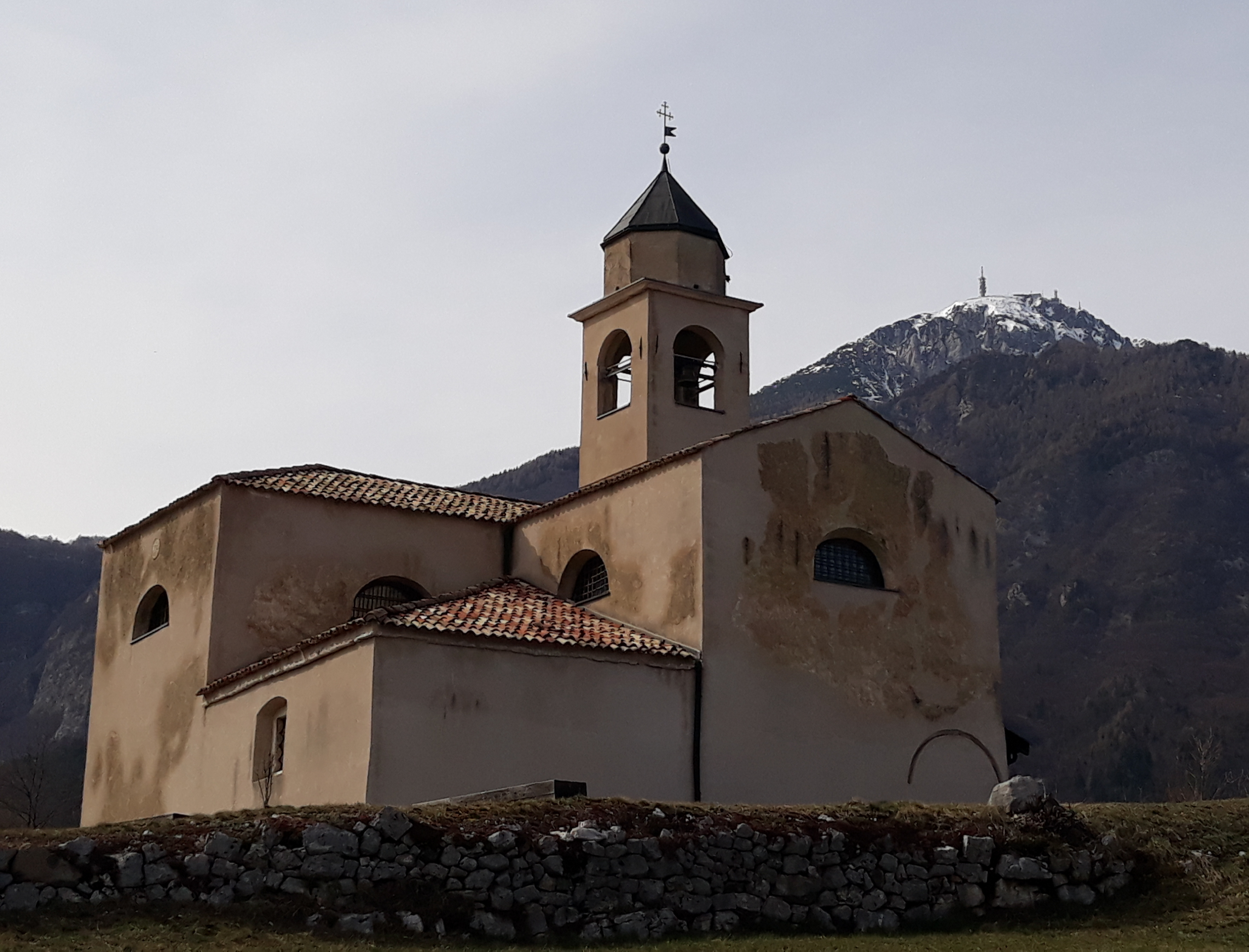 la chiesa con la cima del Bondone